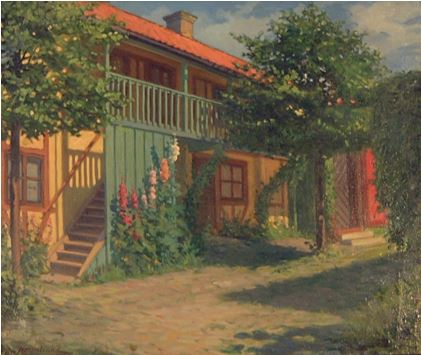 Eget foto av Bror Kronstrands oljemålning av sitt barndomshem. Denna ingår i Bror kronstrands samling som har donerats till Mariestads kommun och är plavcerad på Mariestads stadsbibiotek.